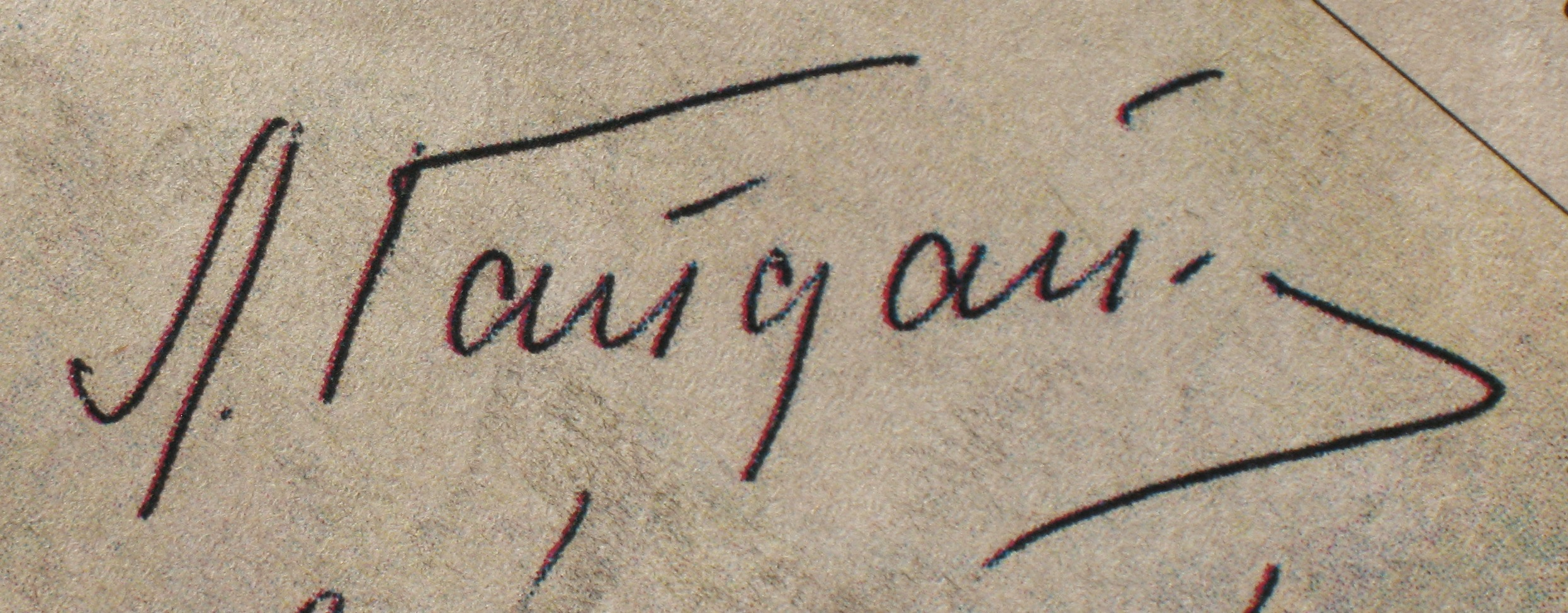 Леонид Гайдай. Автограф на сценарии фильма "Спортлото-82". Крым, лето 1981. Soviet Leonid Gaidai signature (1981).